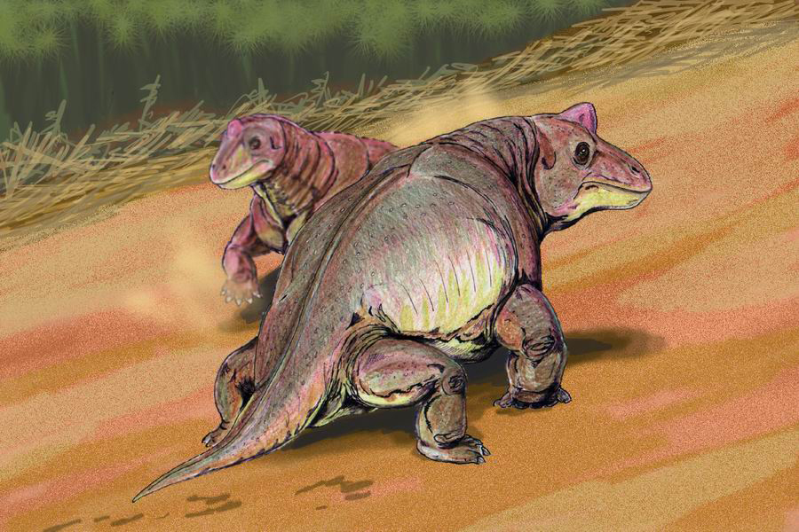 Кератоцефал